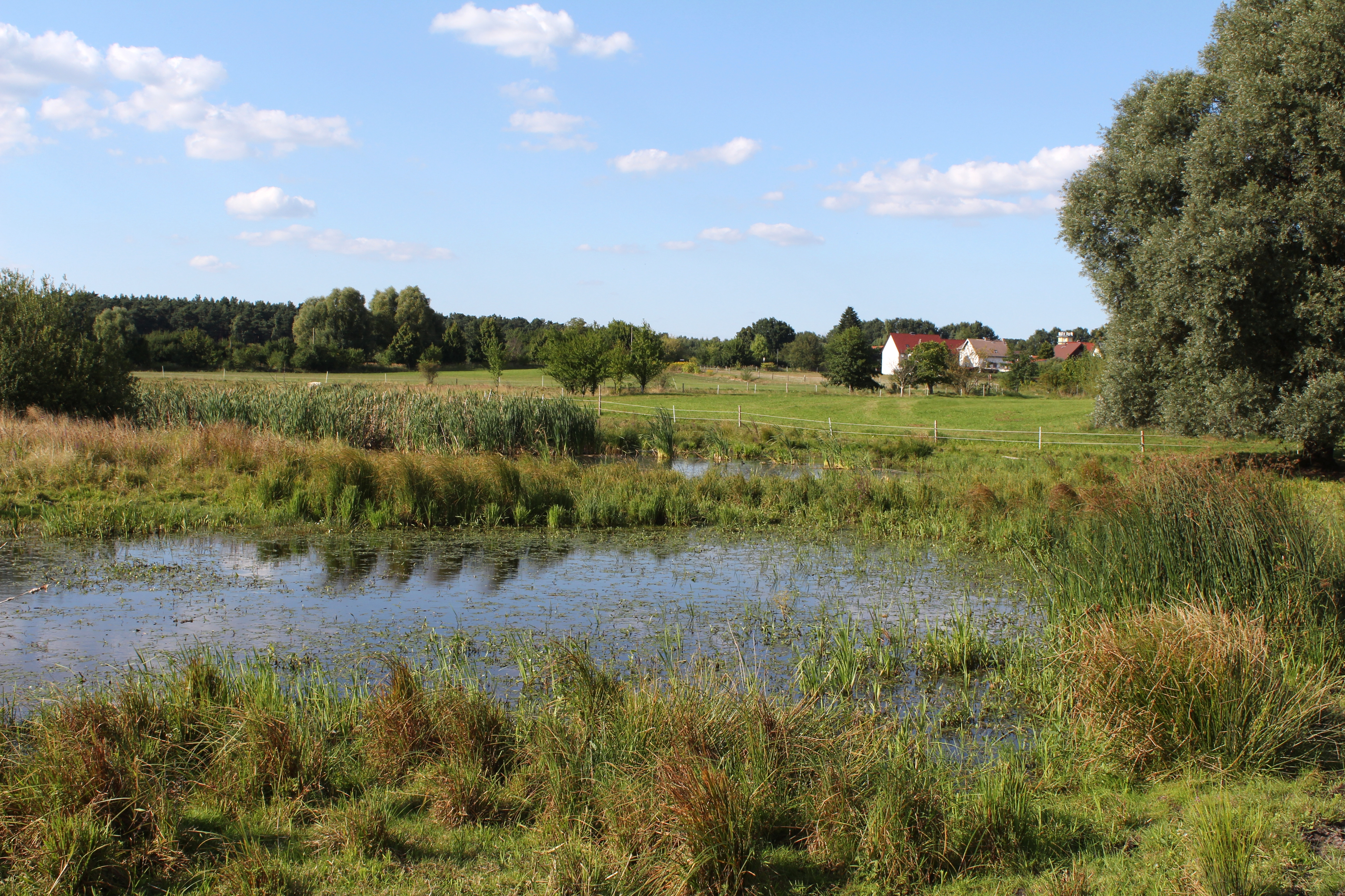 Blick über das Naturschutzgebiet Schäferpfühle Ladeburg Richtung Norden